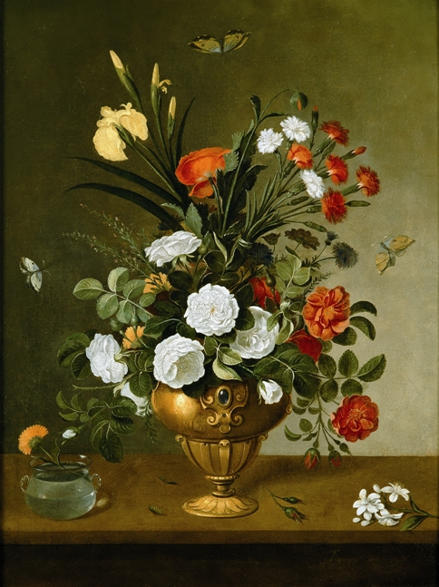 Florerolabel QS:Les,"Florero"